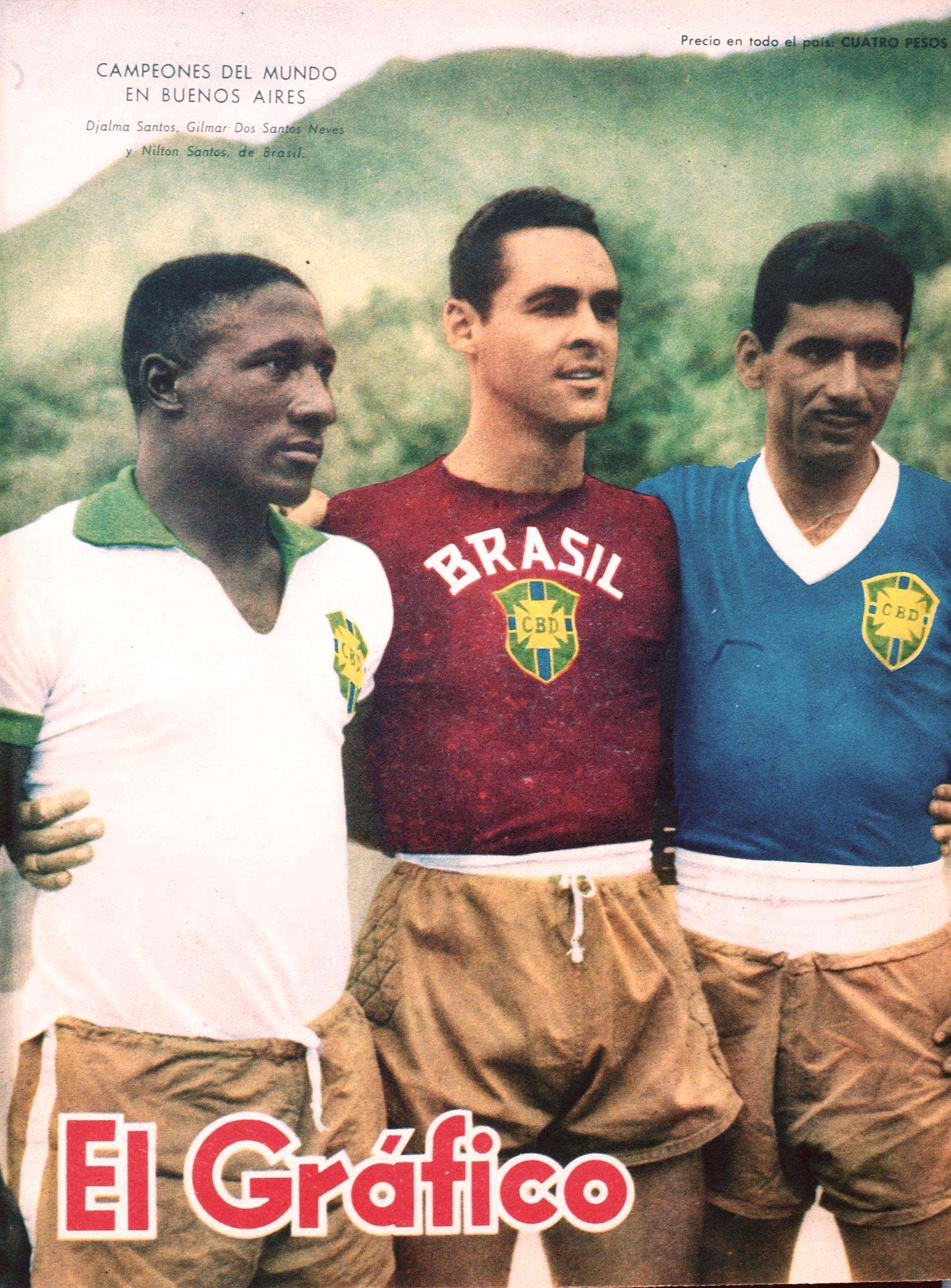 El Grafico del 19 de Marzo de 1959. Edicion 2062